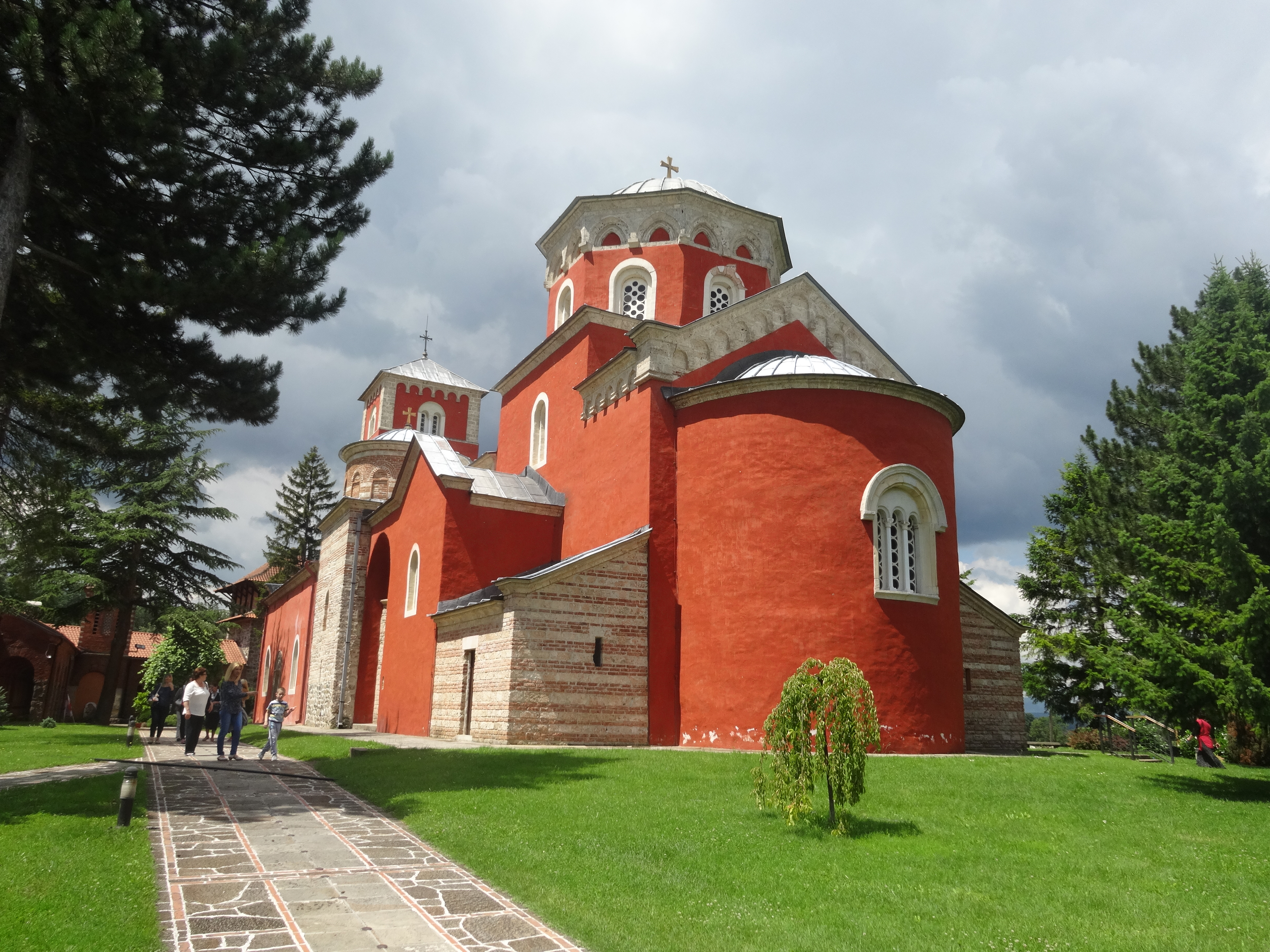 Жича је српски средњовековни манастир из прве половине 13. века, који се налази у близини Краљева. Подигао ју је први краљ Србије, Стефан Немањић.